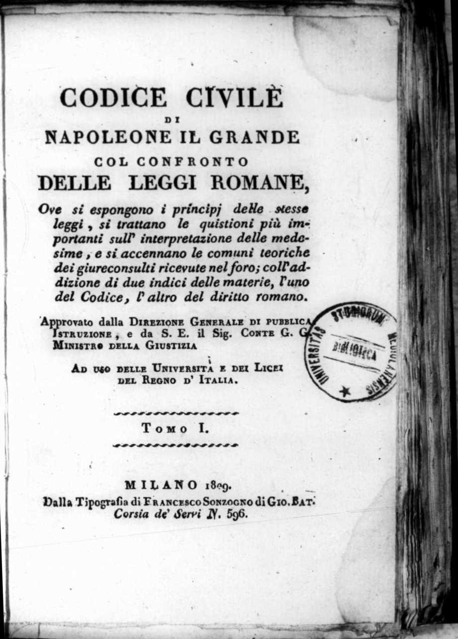 Frontespizio